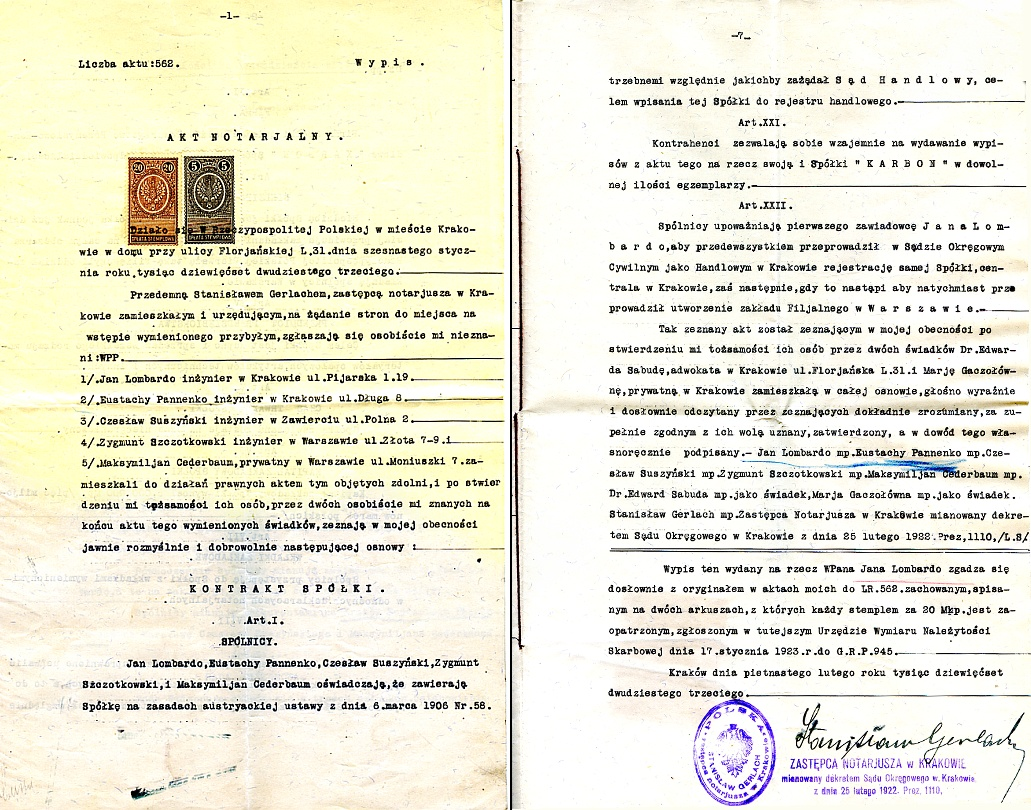 Umowa spółki z ograniczoną odpowiedzialnością zawarta w formie aktu notarialnego: strona pierwsza i ostatnia (siódma)